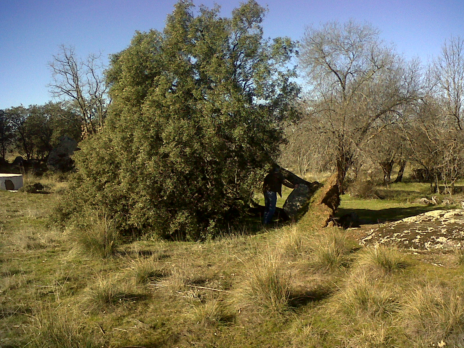 Encina (Quercus ilex) derribada por el viento (España)